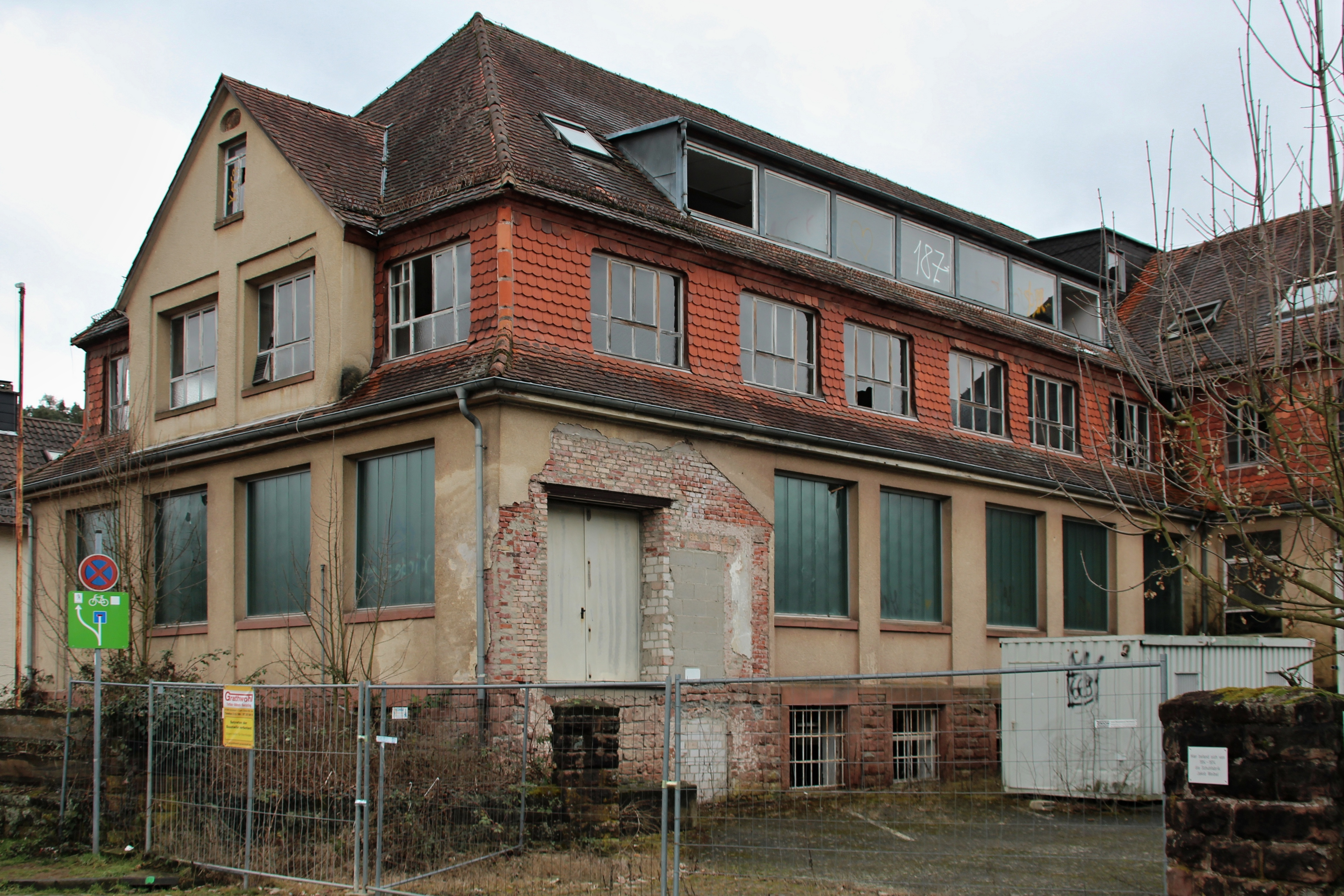 verlassene Schufabrik Jakob Weibel (1914 - 1974)